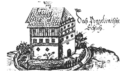 Schloss Kulmain am Weiher: Ponzelinsches_Schloss in Kulmain